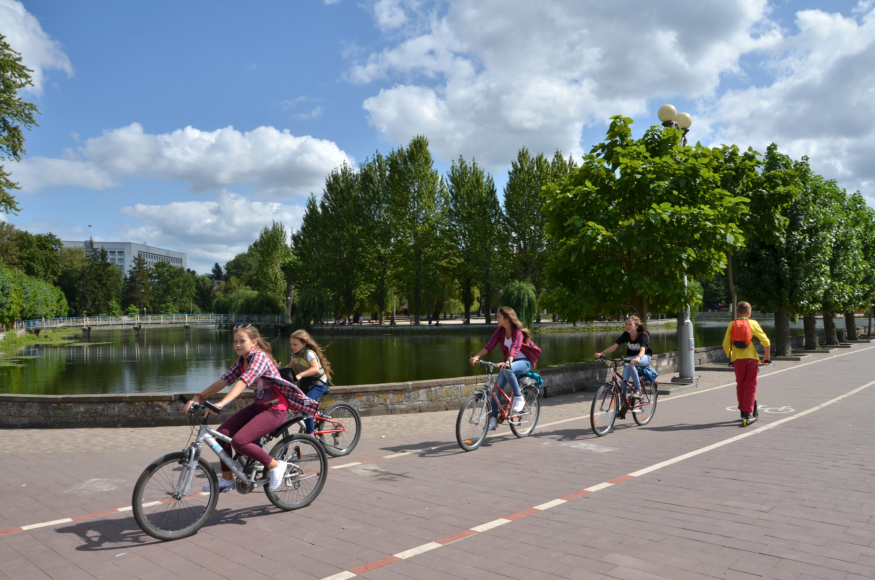 Тернопільські дівчата-велосипедистки на велодоріжці в парку імені Тараса Шевченка.